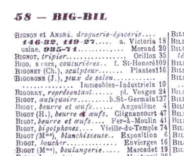 Page 58 de l'annuaire apparaît Bigot, fabricant de bigotphones.